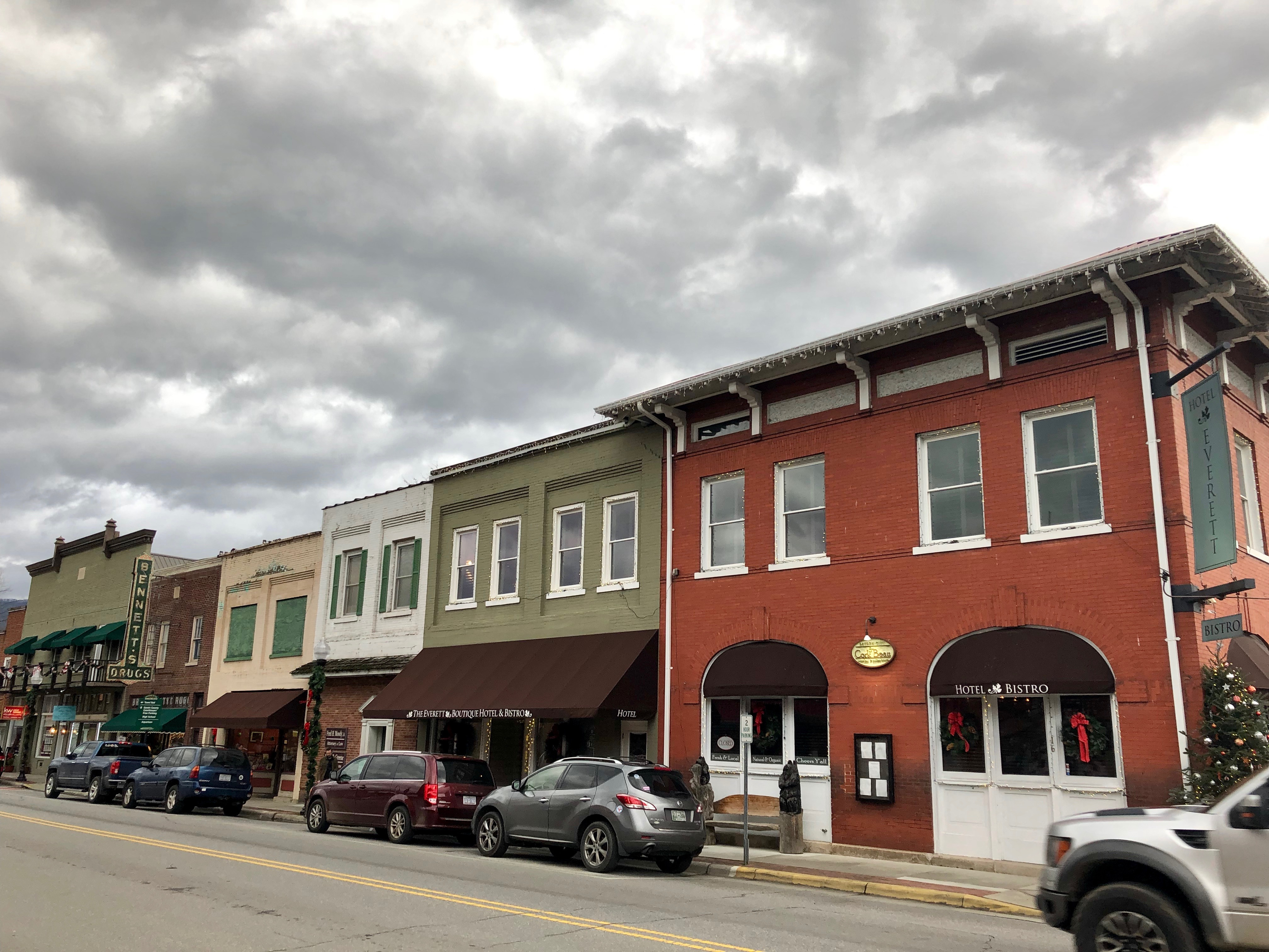 Everett Street, Bryson City, NC